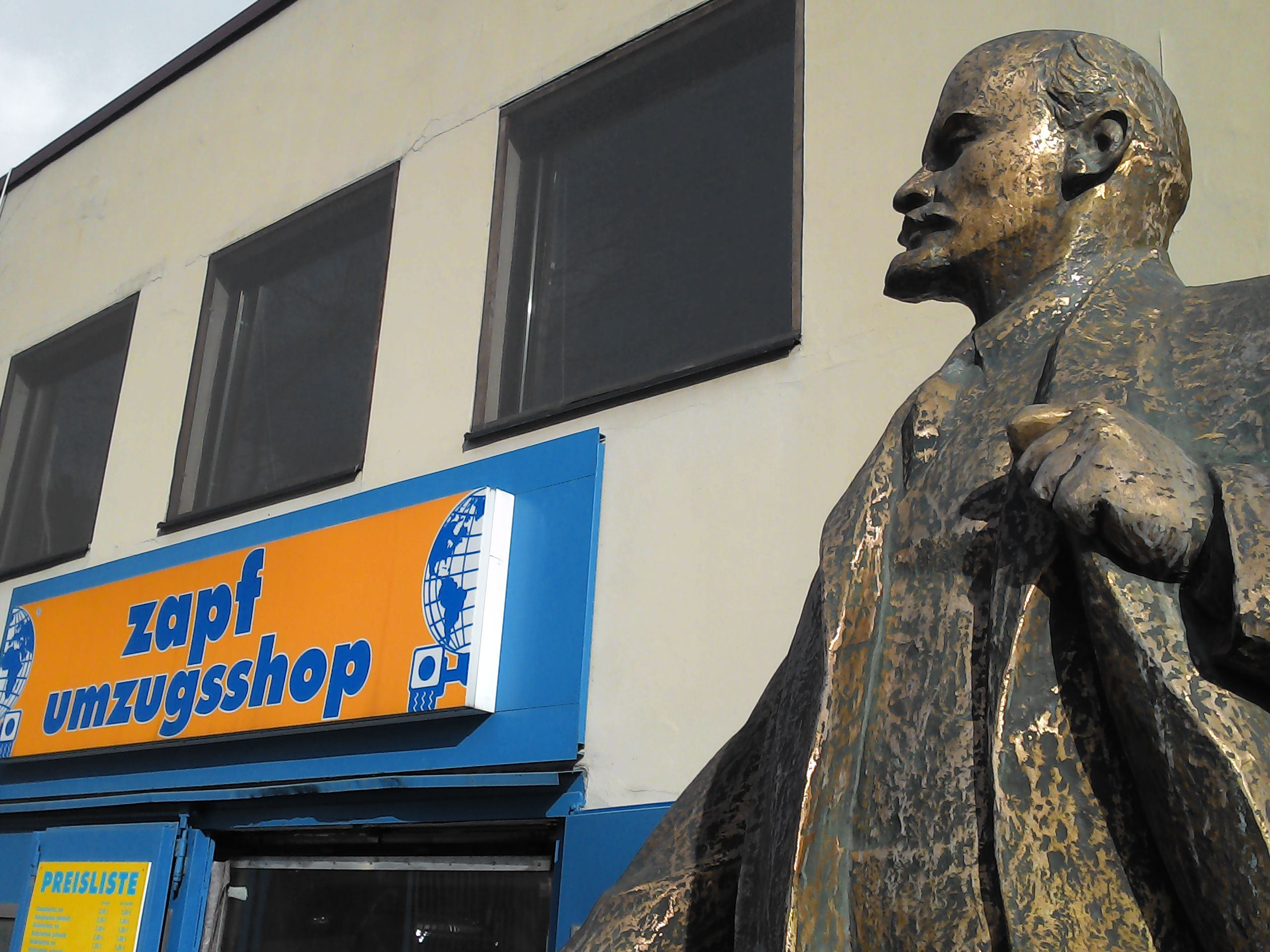 zapf umzüge AG, 1975 gegründete internationale Umzugsfachspedition mit Sitz in Berlin und Filialen in sieben weiteren Städten. Lenin-Statue auf dem ehemaligen Gelände von Zapf an der Brommystraße in Berlin-Kreuzberg. Entstehungsjahr und Künstler sind nicht bekannt.